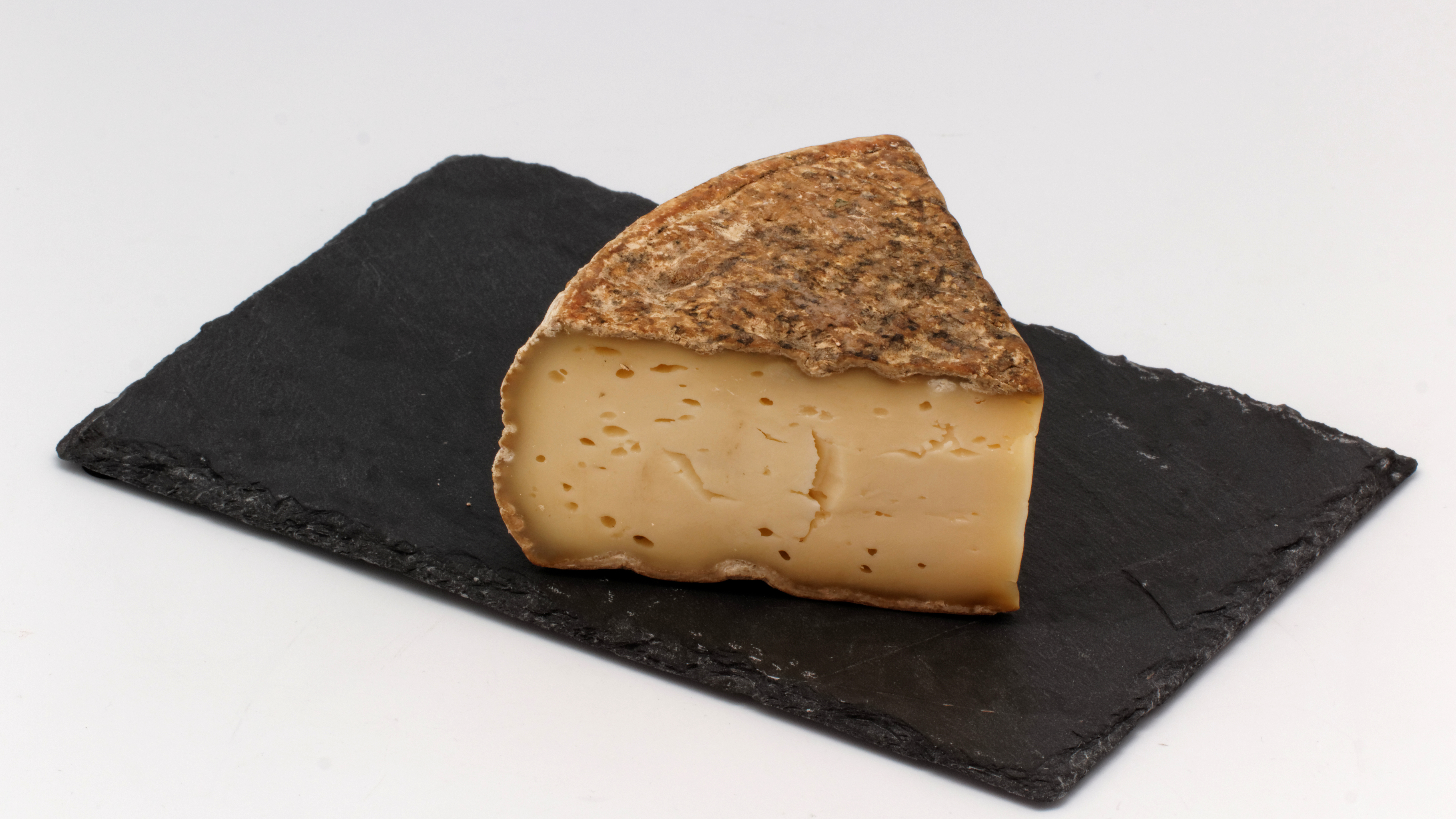 Tomme de Savoie ; Androuet 17e